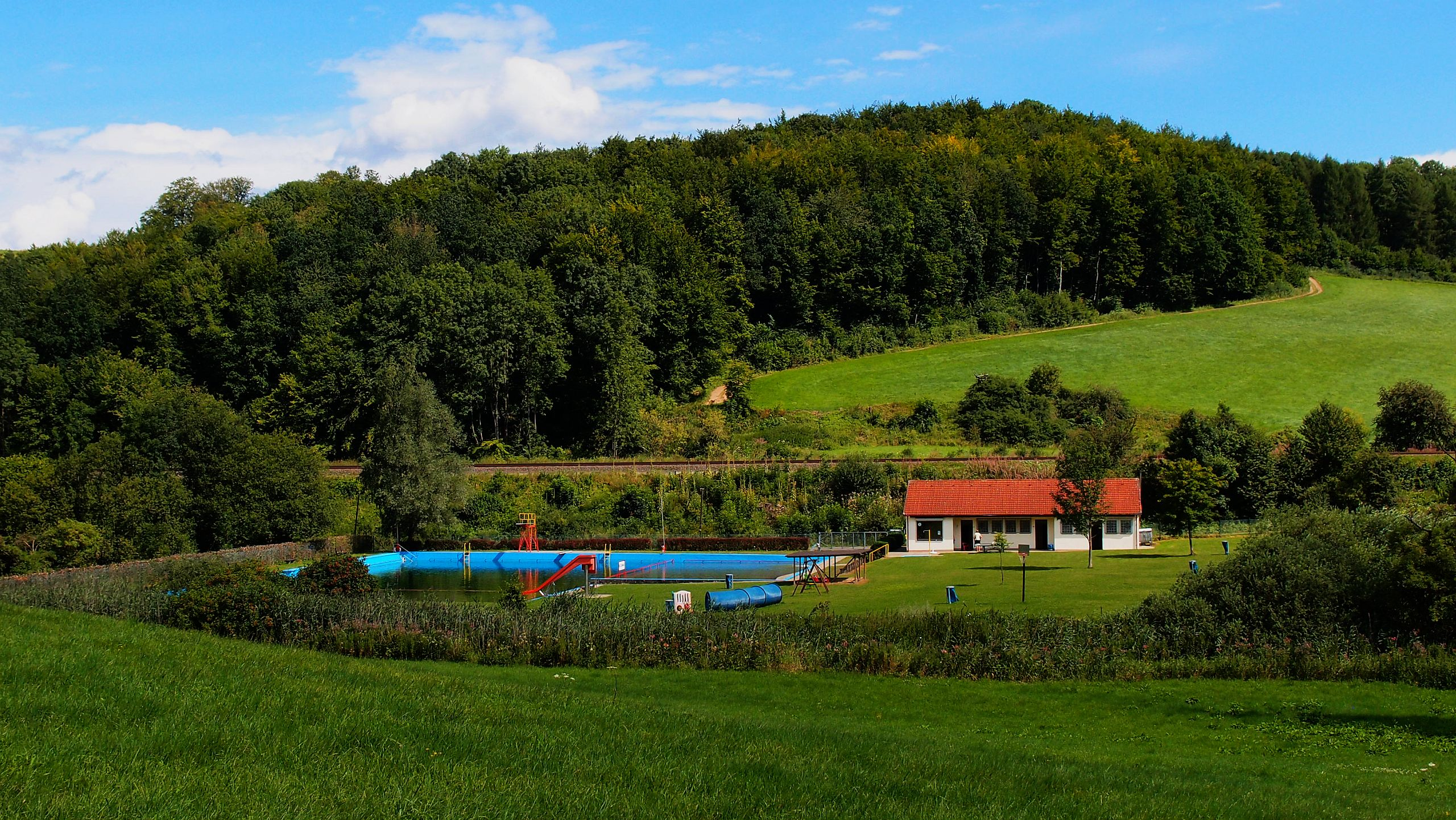 Das Freibad von Barbis am östlichen Ortsrand. Im Hintergrund das Gleis der Südharzbahn und der Butterberg